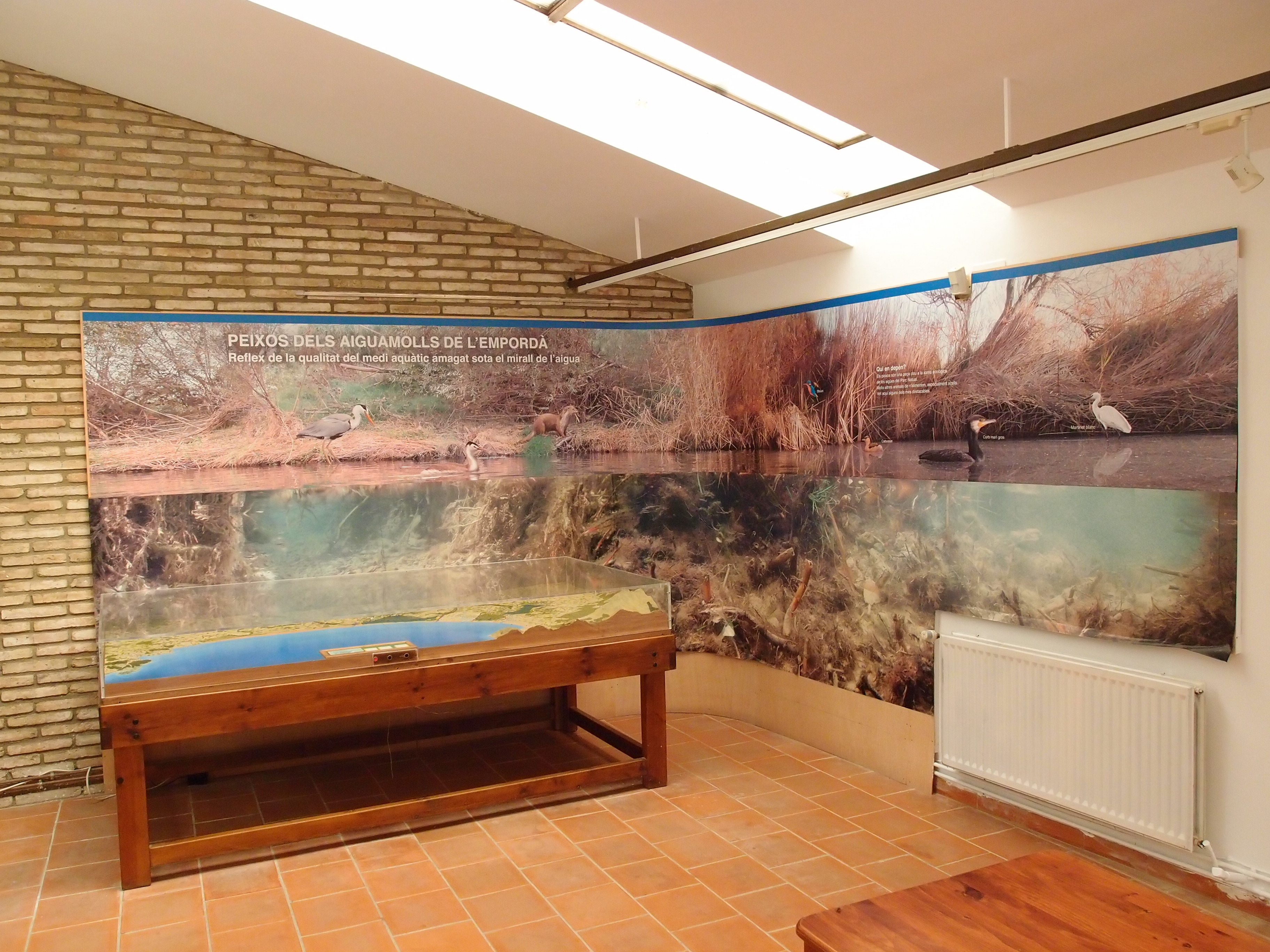 Naturpark Aiguamolls (Ausstellung)- Katalonien/Spanien Datum: 16.09.2011 Urheber: M. Pfeiffer alias Gordito1869 Quelle: Privates Fotoarchiv des Urhebers